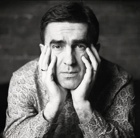 Вячеслав Бутусов / Группа "Наутилус-Помпилиус". Алексей Никишин. 2008